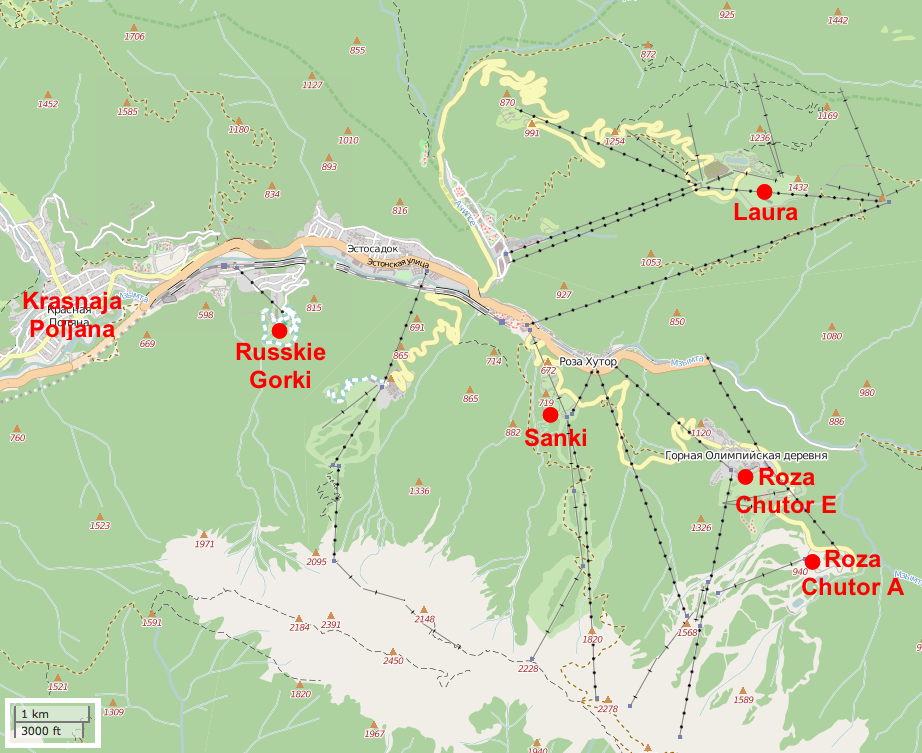 Olympiska tävlingsplatserna (2014) i Krasnaja Poljana.